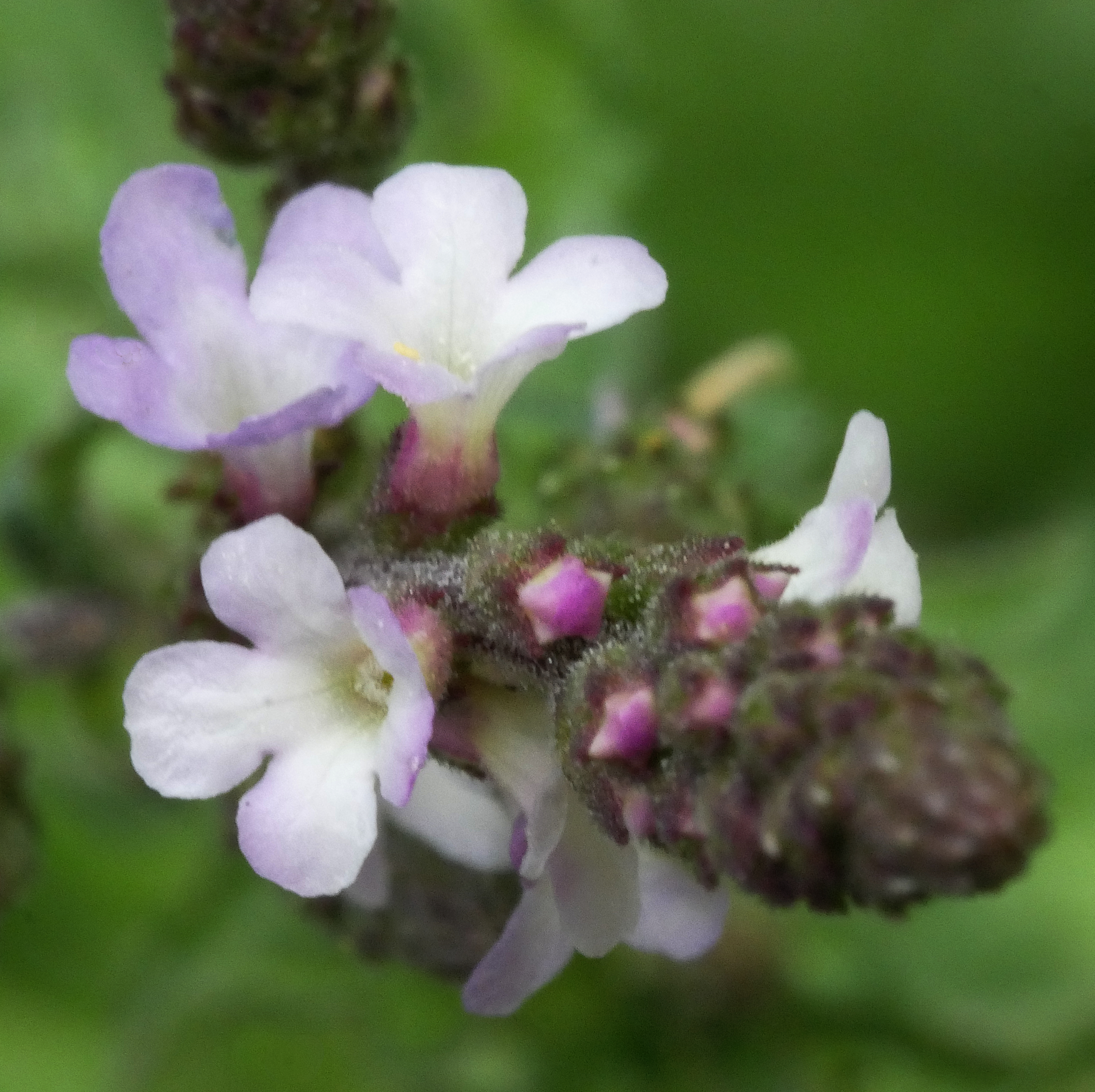 Echtes Eisenkraut (Verbena officinalis) im Freilichtmuseum Roscheider Hof. Standort: Kräutergarten